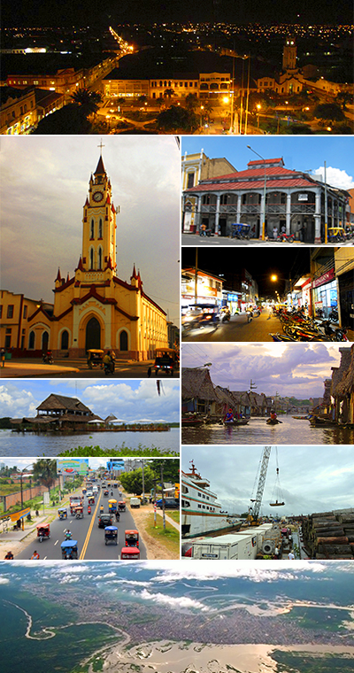 Muestra fotográfica de la Ciudad de Iquitos en un collage, actualización del anterior collage